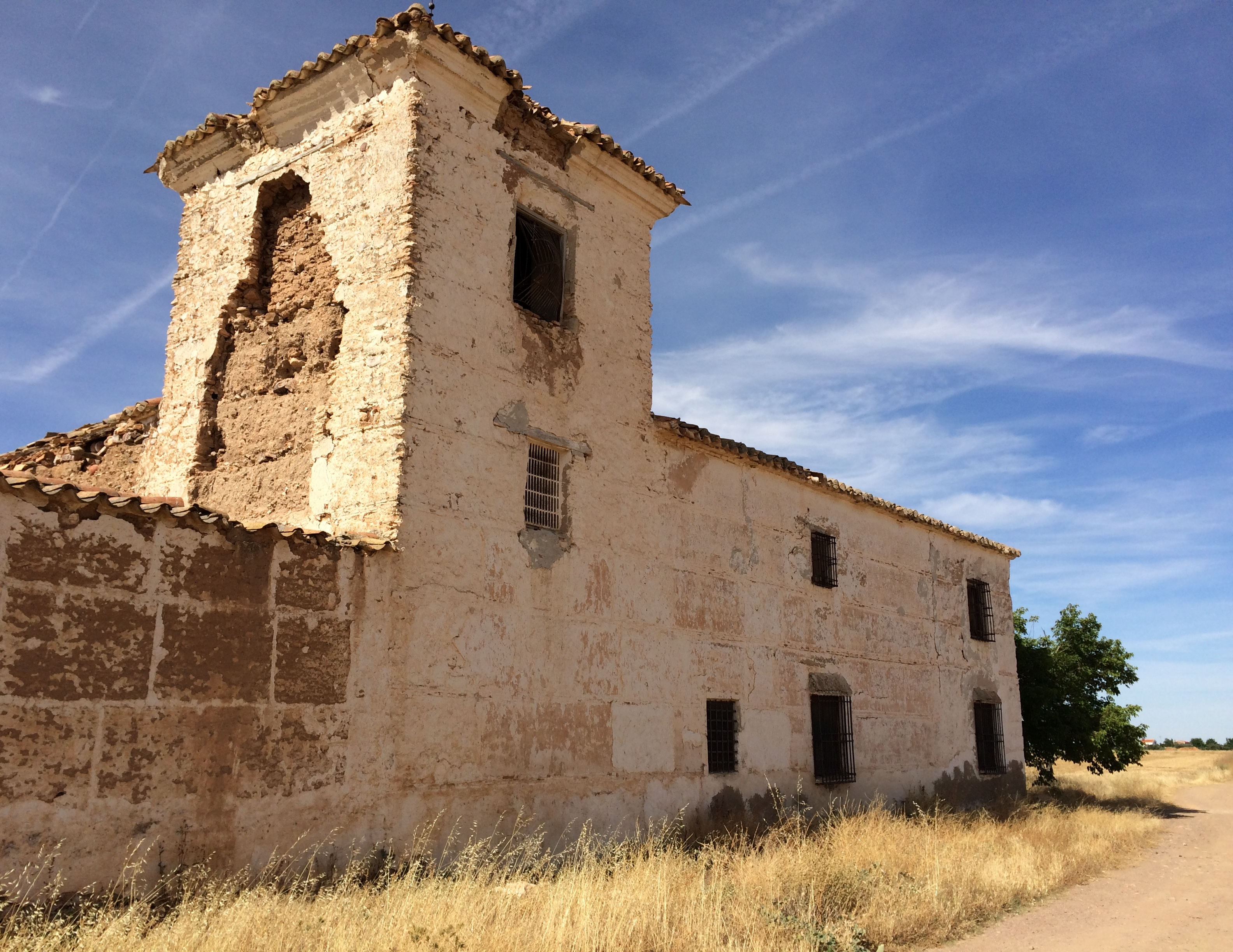 Estado actual de la Venta de Borondo: Necesidad urgente de intervención. Amenaza de ruina de torre y techumbres.